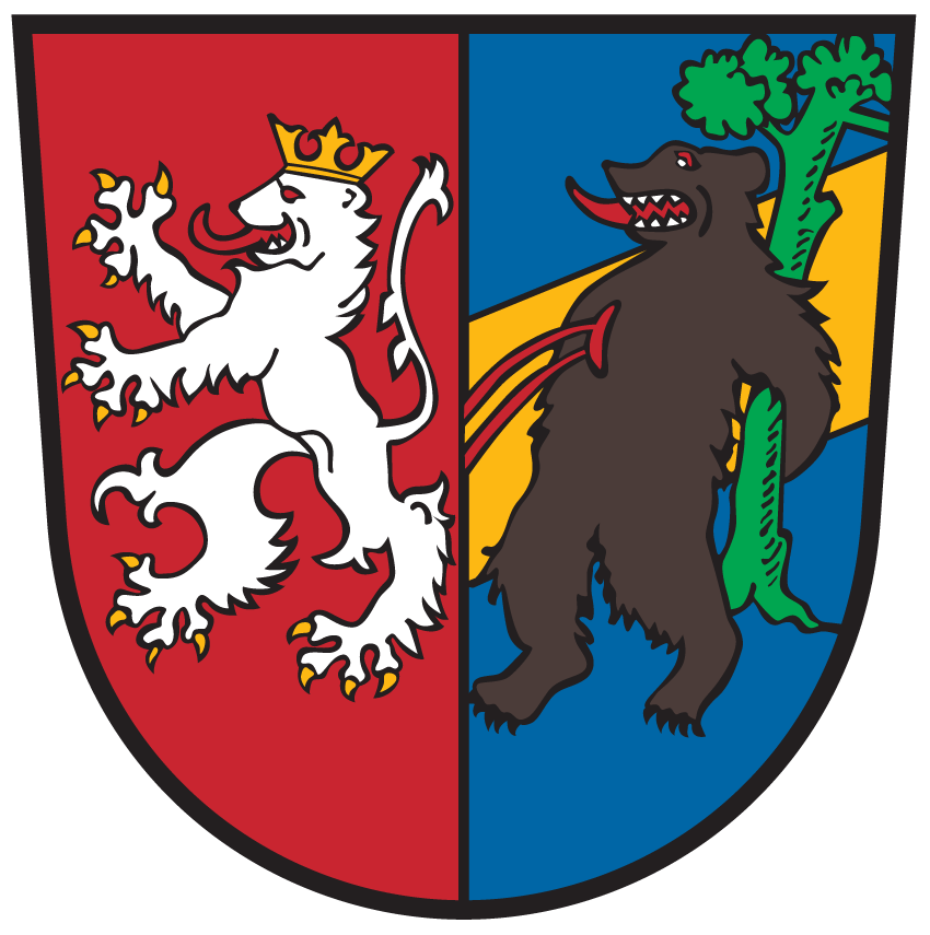 Wappen von Kötschach-Mauthen